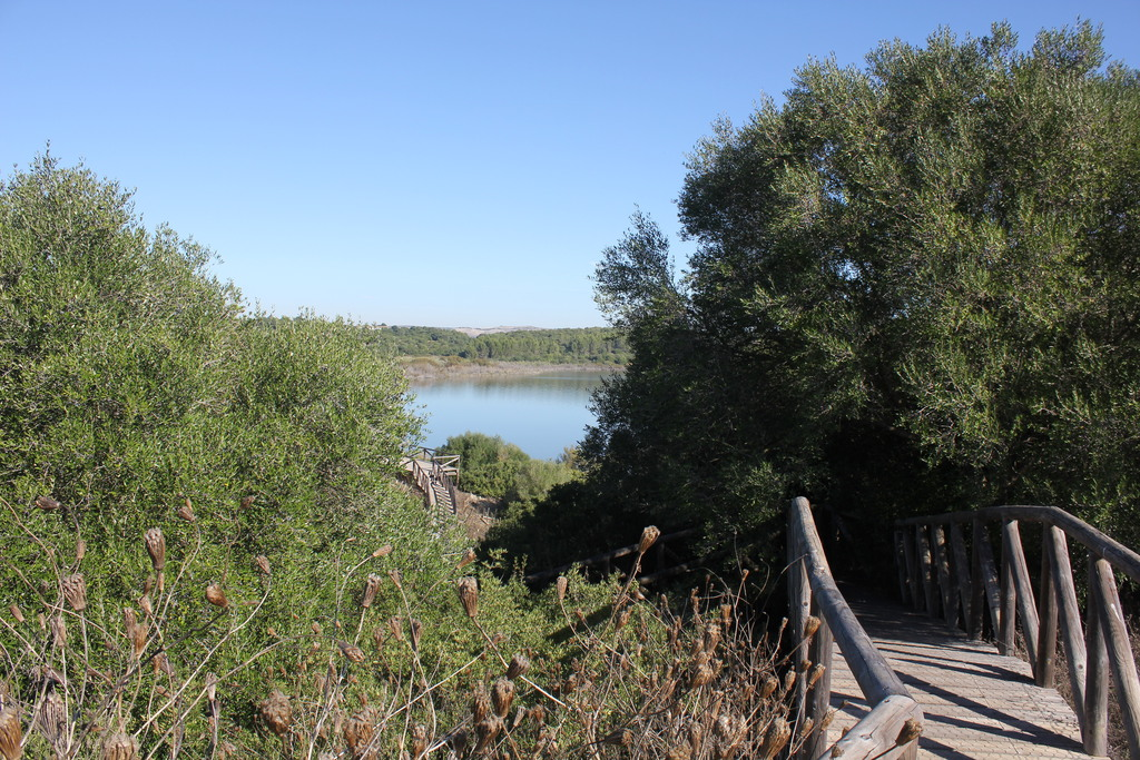 Laguna de Medina, Jerez de la Frontera (Andalucía, España)